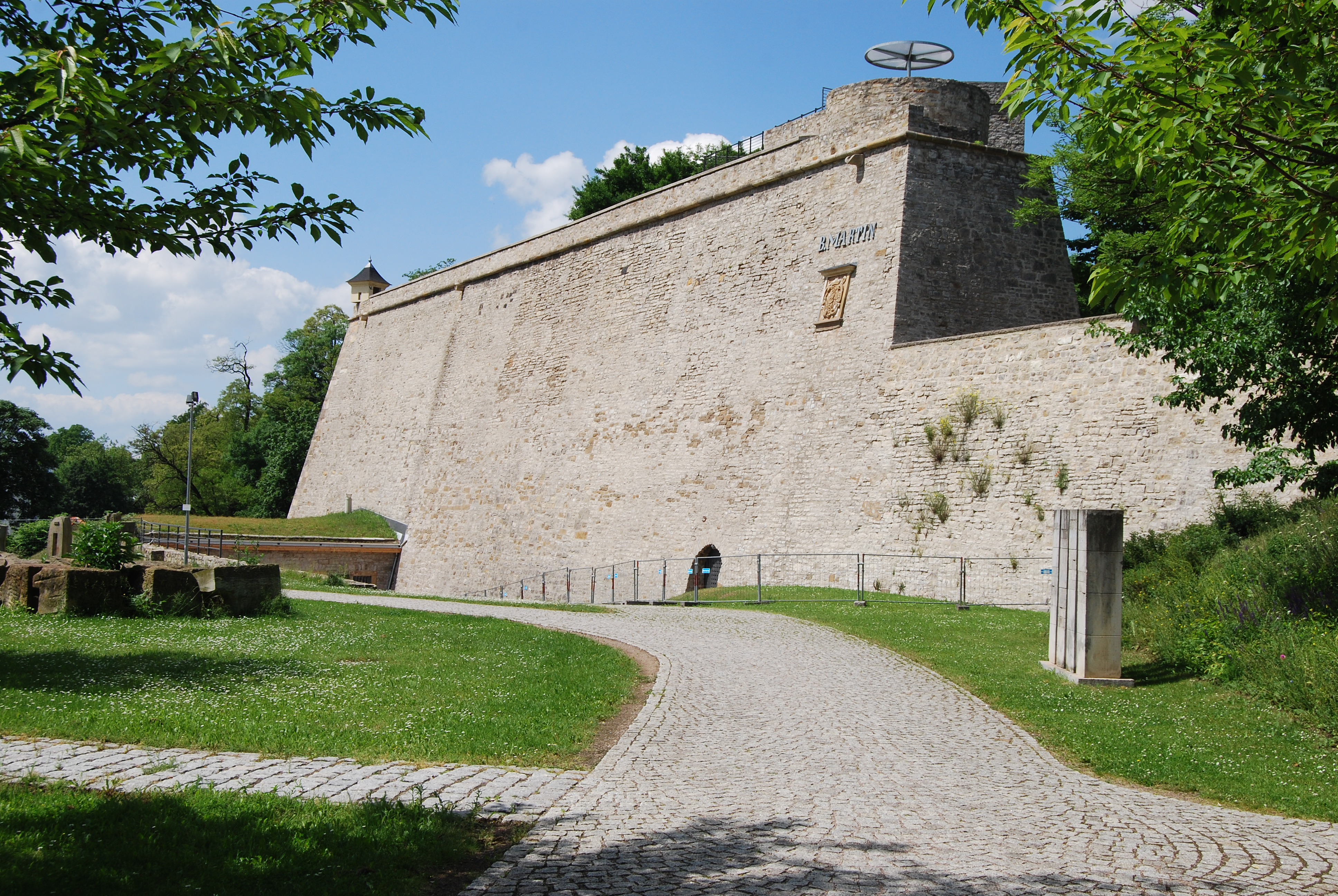 Die Südostseite der "Bastion Martin" im südlichen Teil der "Zitadelle Petersberg" in Erfurt am 31. Mai 2014